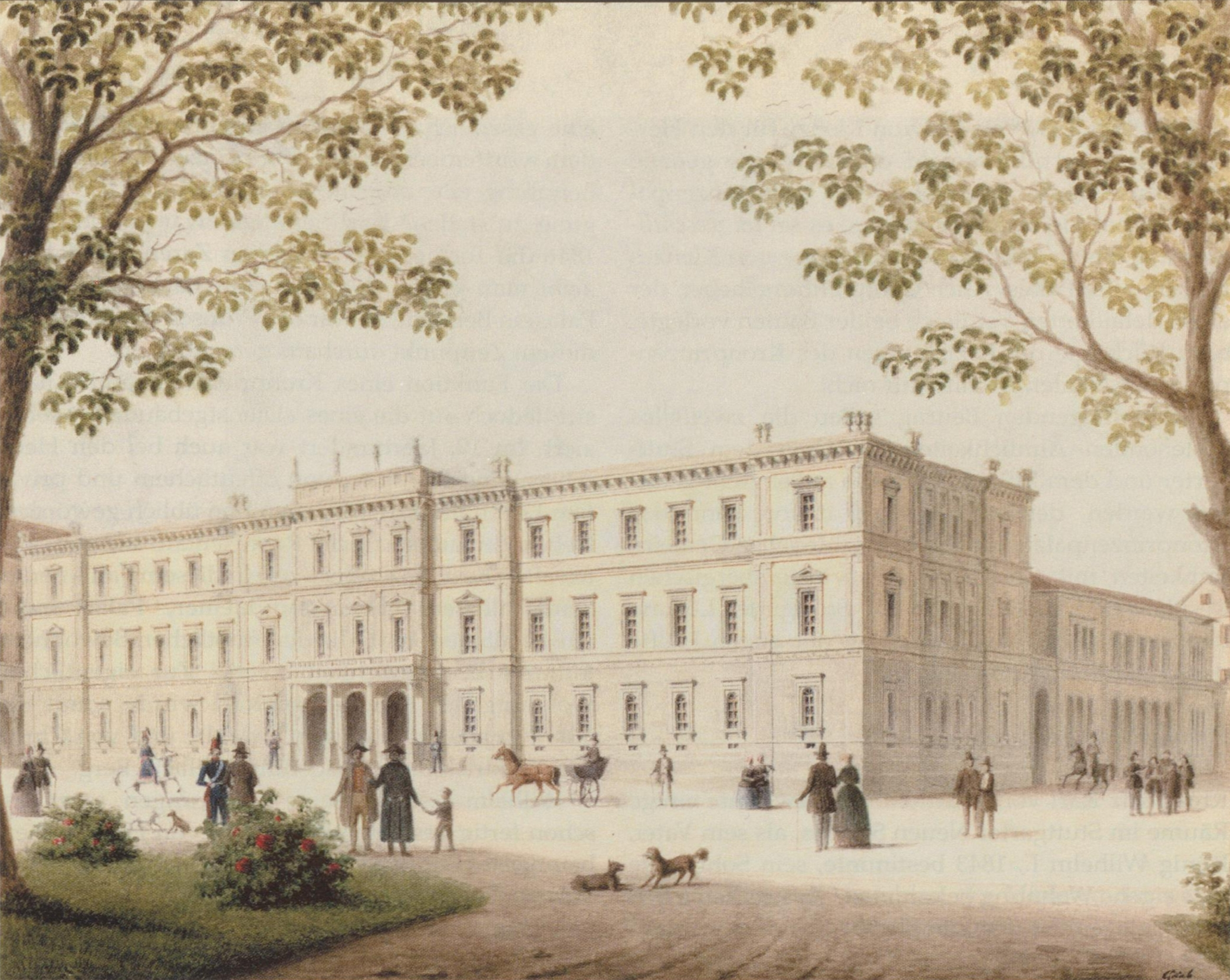 Ludwig Friedrich Gaab: Schaubild. Entwurf für das Kronprinzenpalais in Stuttgart, 1845.